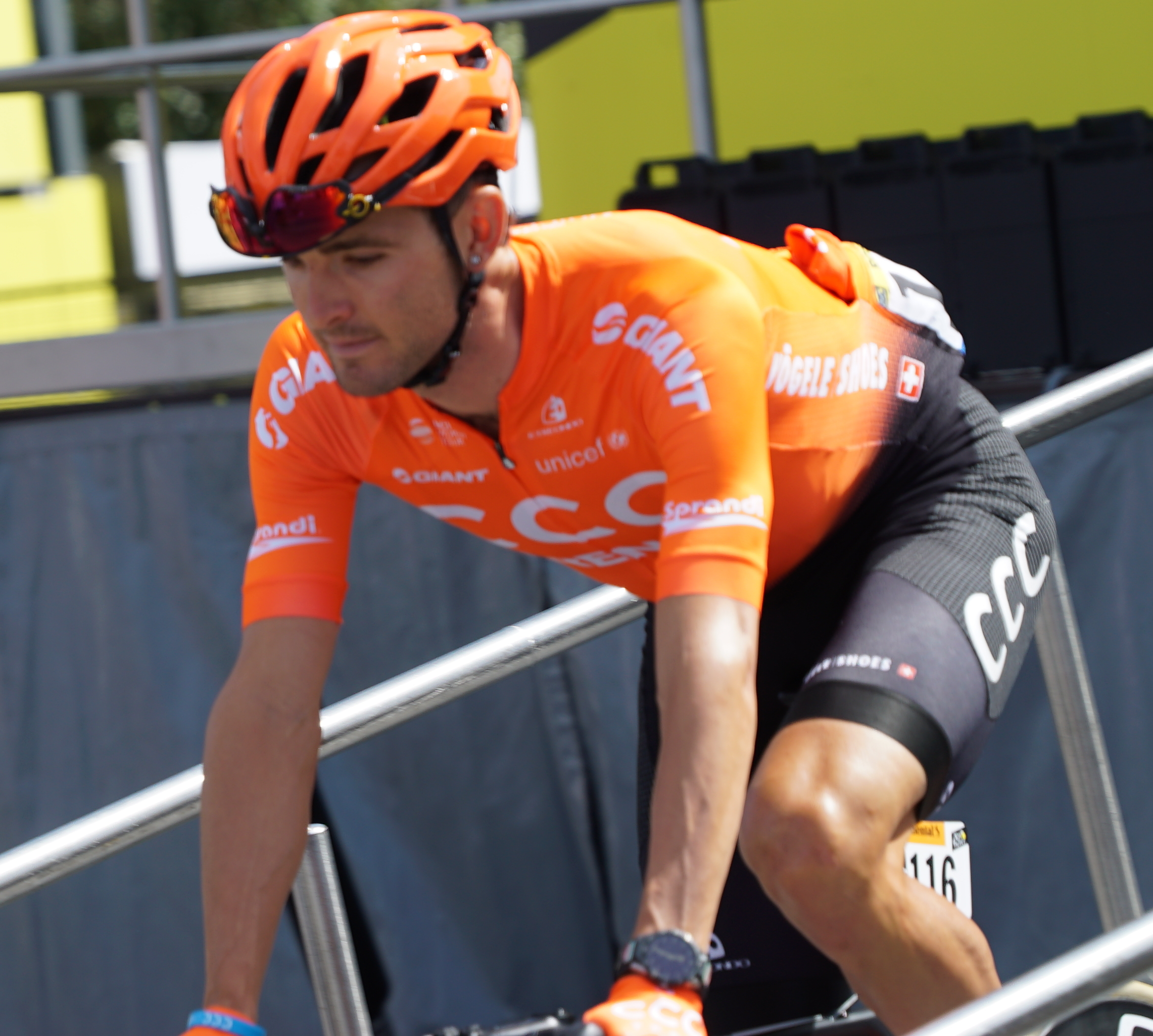 signature avant le départ de l'étape 4.